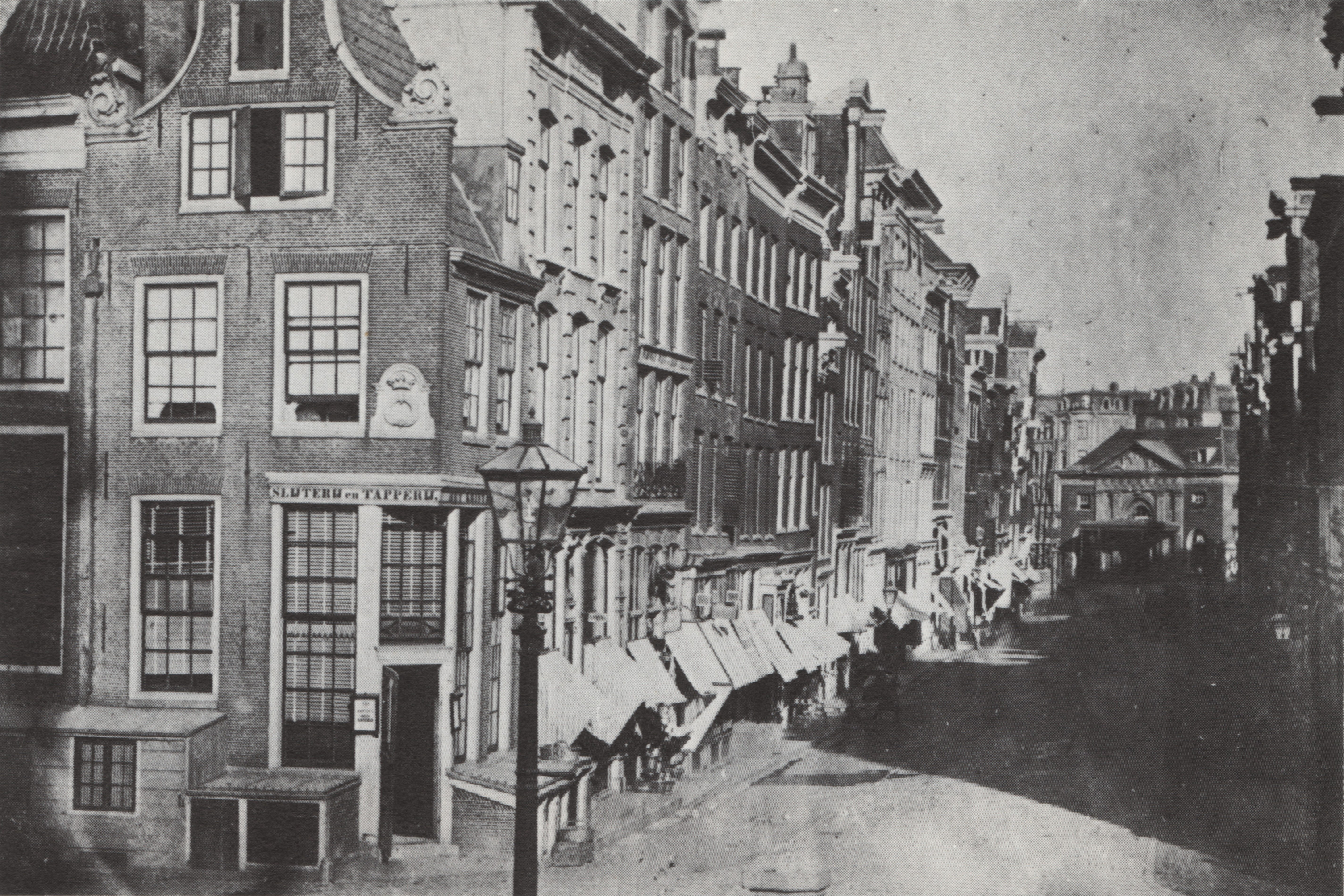 Reguliersbreestraat richting Botermarkt (nu Rembrandtsplein) met Regulierswaag.